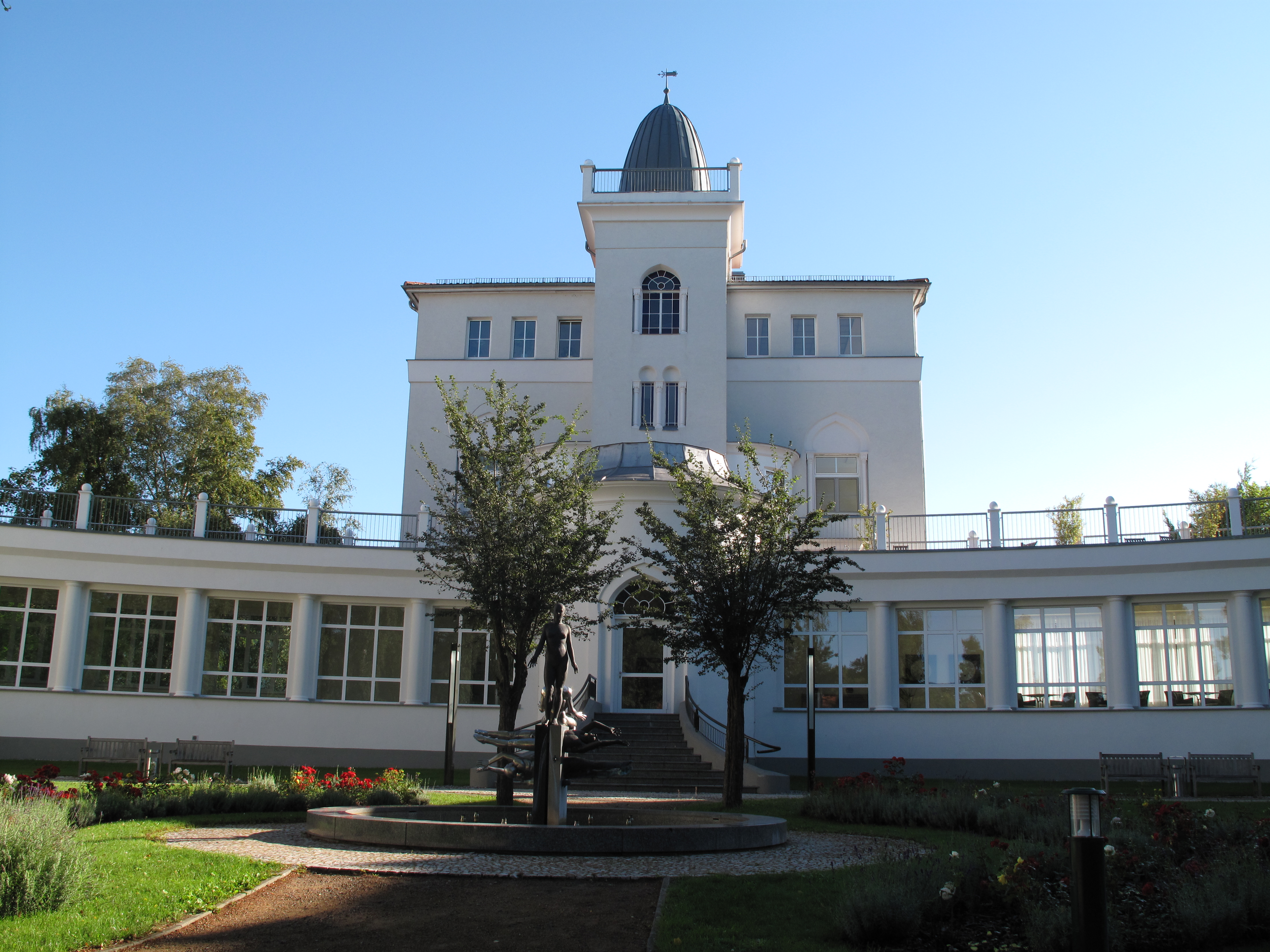 Asklepios Klinikum Birkenwerder (Brandenburg) - Deutschland